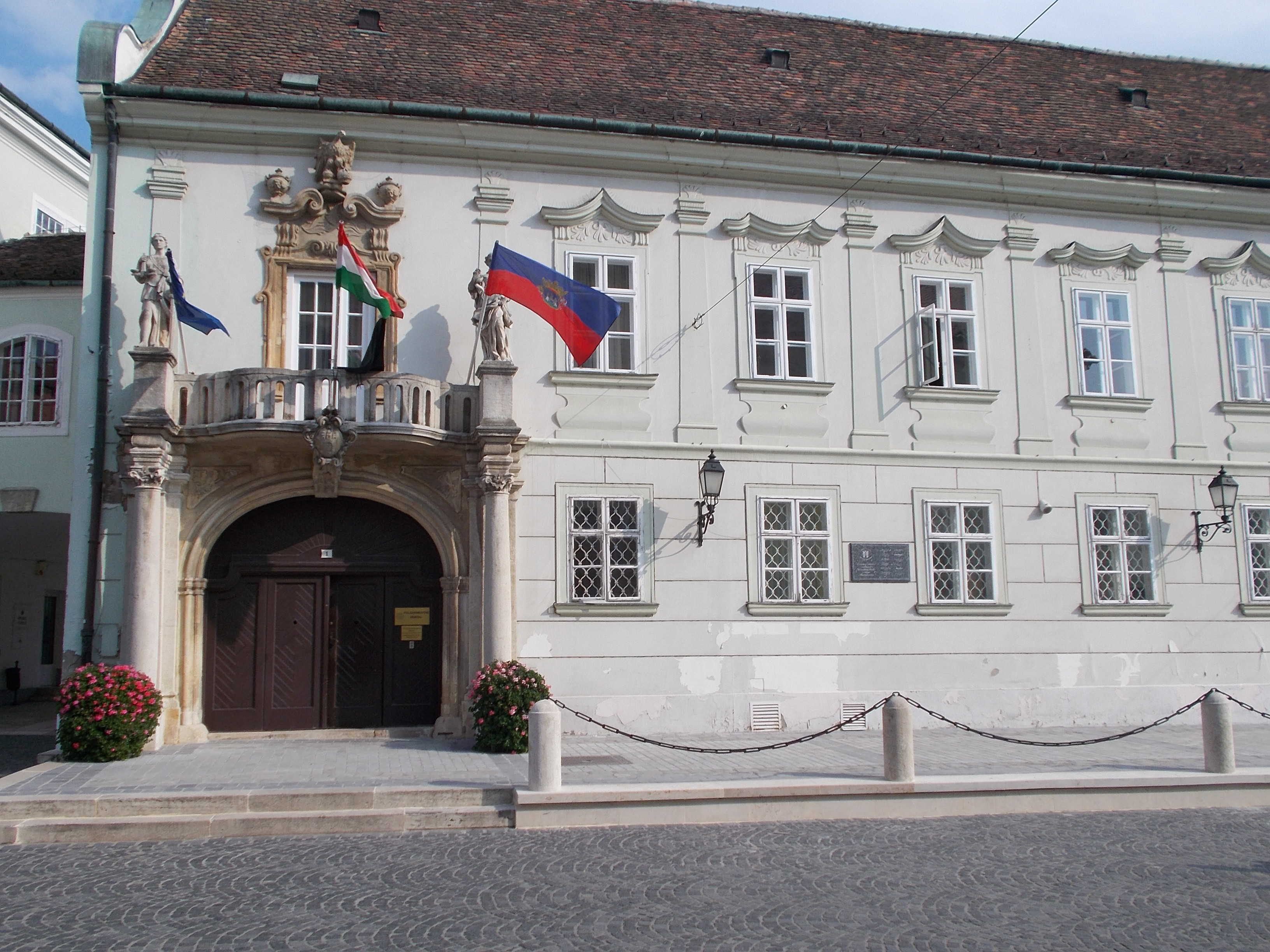 Városháza. 17. századi eredetű, barokk műemlék ház ID 3915, Bővítve 1712-1718. Mai alakjában késő barokk, 1790. Udvari beépítése 1937-1938-ból. Szabálytalan alaprajzú, kétszintes, belső udvaros copf stílusú épületegyüttes, cseréptetővel. Valamennyi ablaknyílása szalagkeretes, egyenes záródású, domborított mezőkkel, ornamentális dísszel. - Fejér megye, Székesfehérvár, Belváros, Városház tér 1., Kossuth u. 1. This is a photo of a monument in Hungary. Identifier: 3915